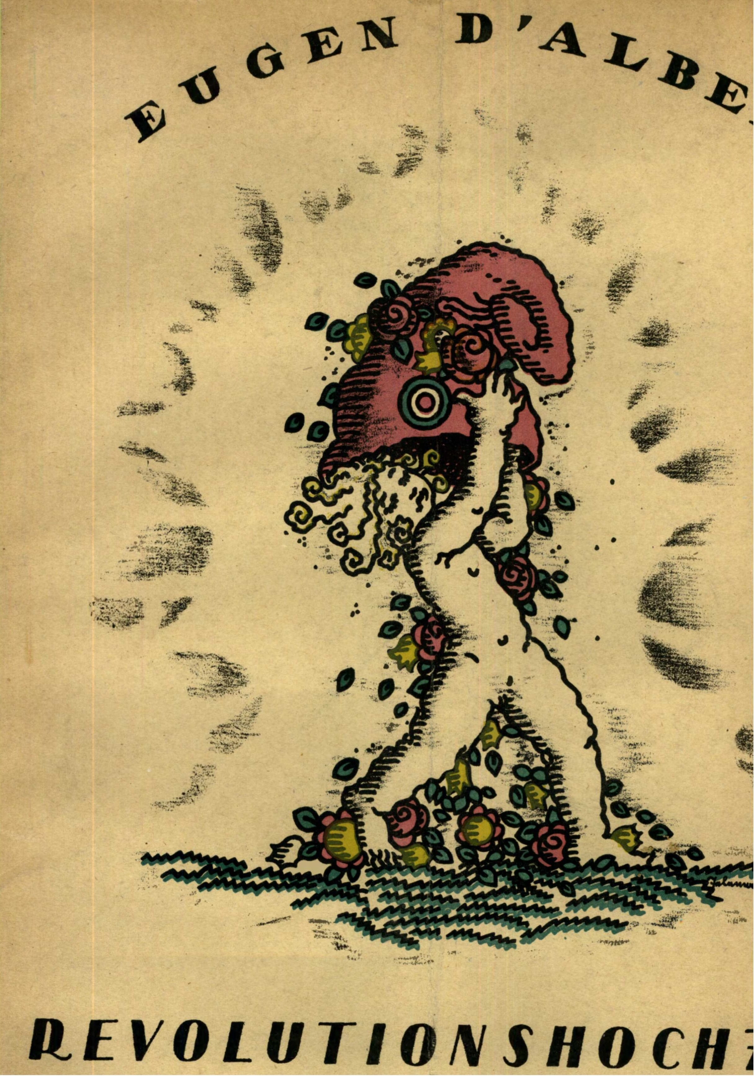 Illustration aus dem Textbuch der Oper Revolutionshochzeit.